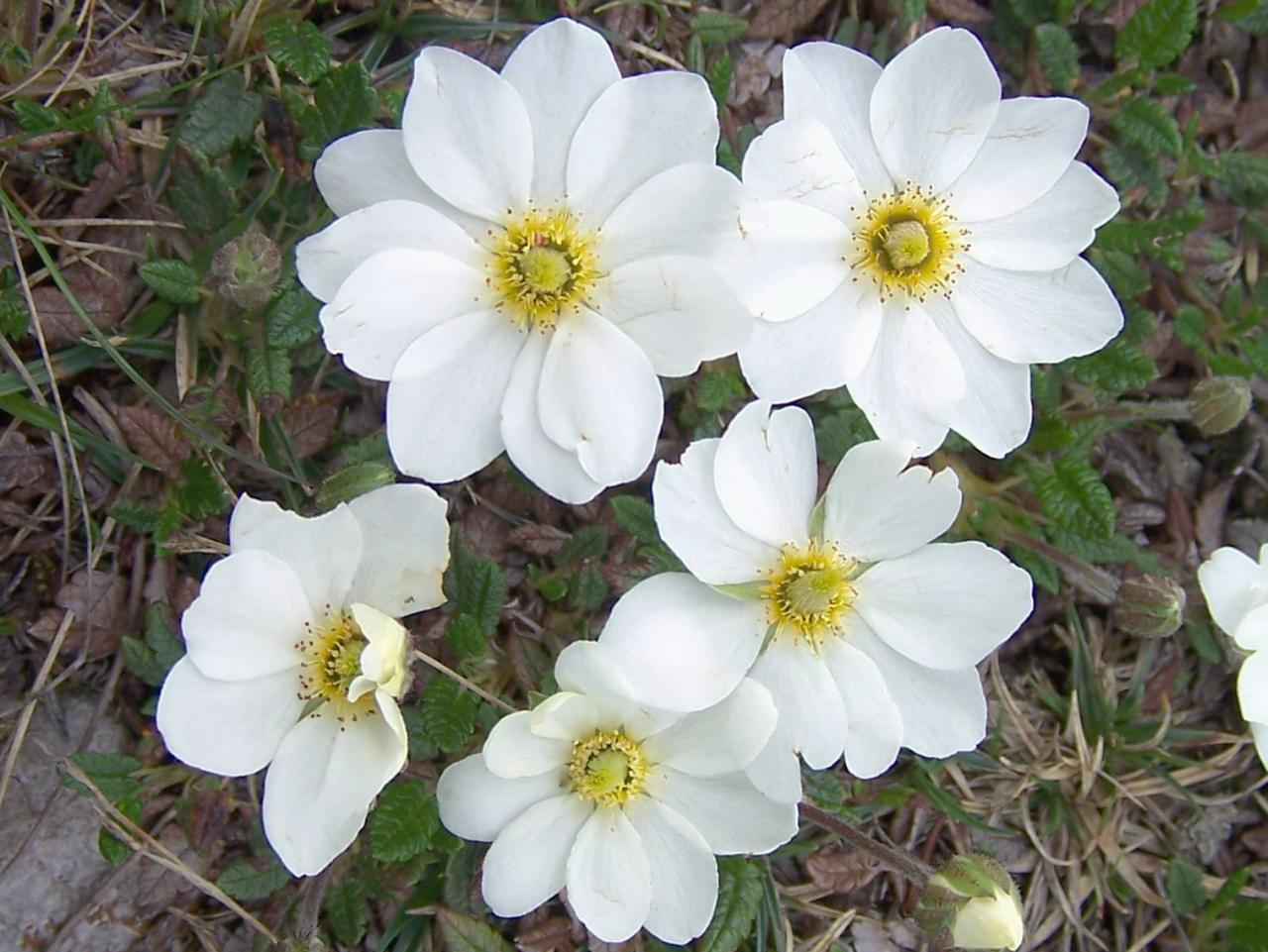 Dryas octopetala (pl. dębik ośmiopłatkowy), habitat:Tatra Mountains, Hala Upłaz